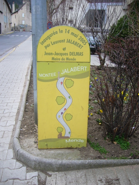 Borne au pied de la montée Laurent Jalabert, Mende, Lozère (France)